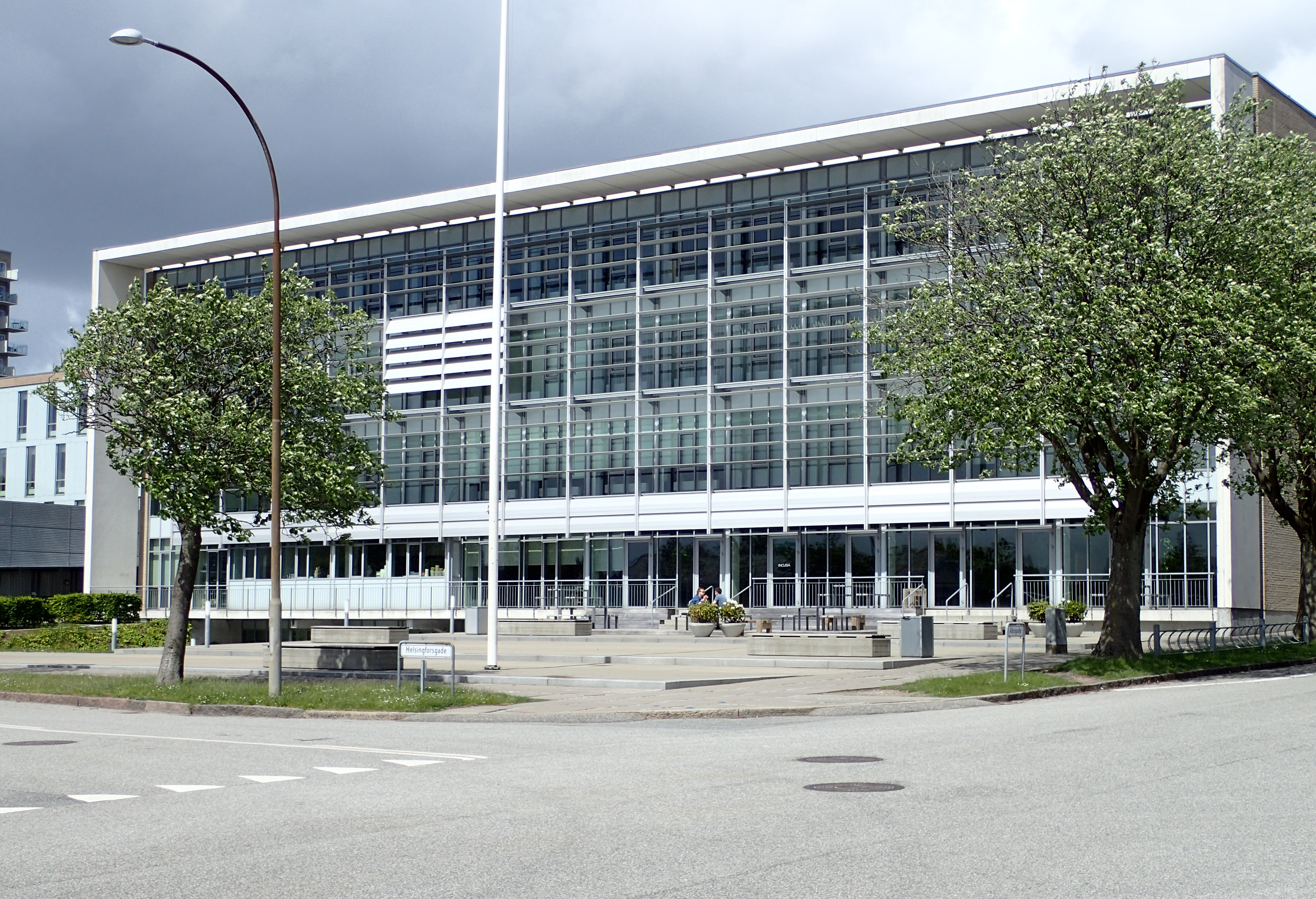 INCUBA Katrinebjerg. Opført 2006 som IT-huset Katrinebjerg.